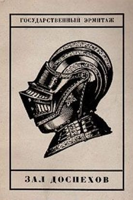 Обложка каталога ""Государственный Эрмитаж. Зал доспехов"